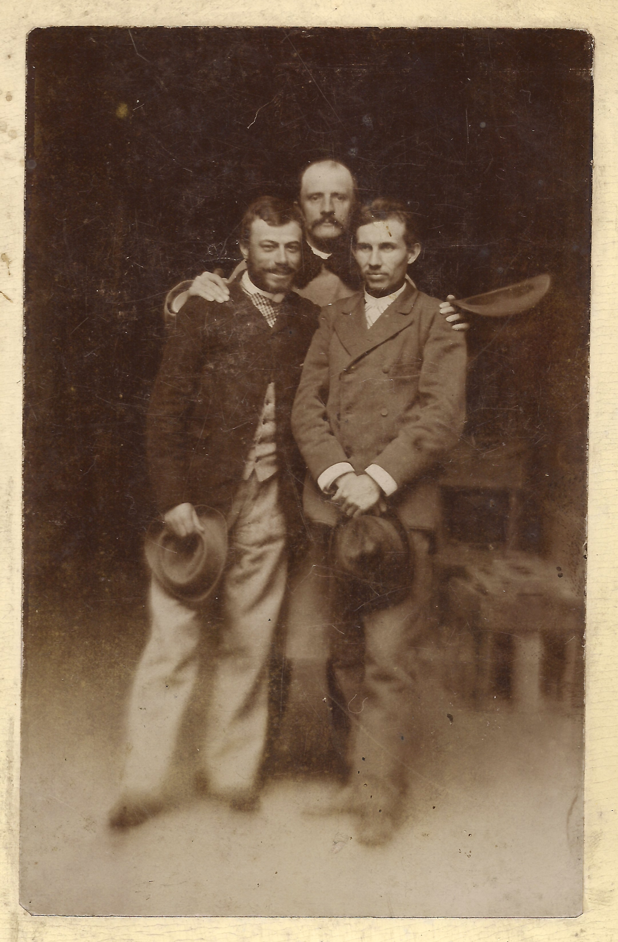 Edward Webersfeld (1845-1918) i dwaj inni aktorzy. Galicja, być może okolice Brodów, ok. 1880 r.